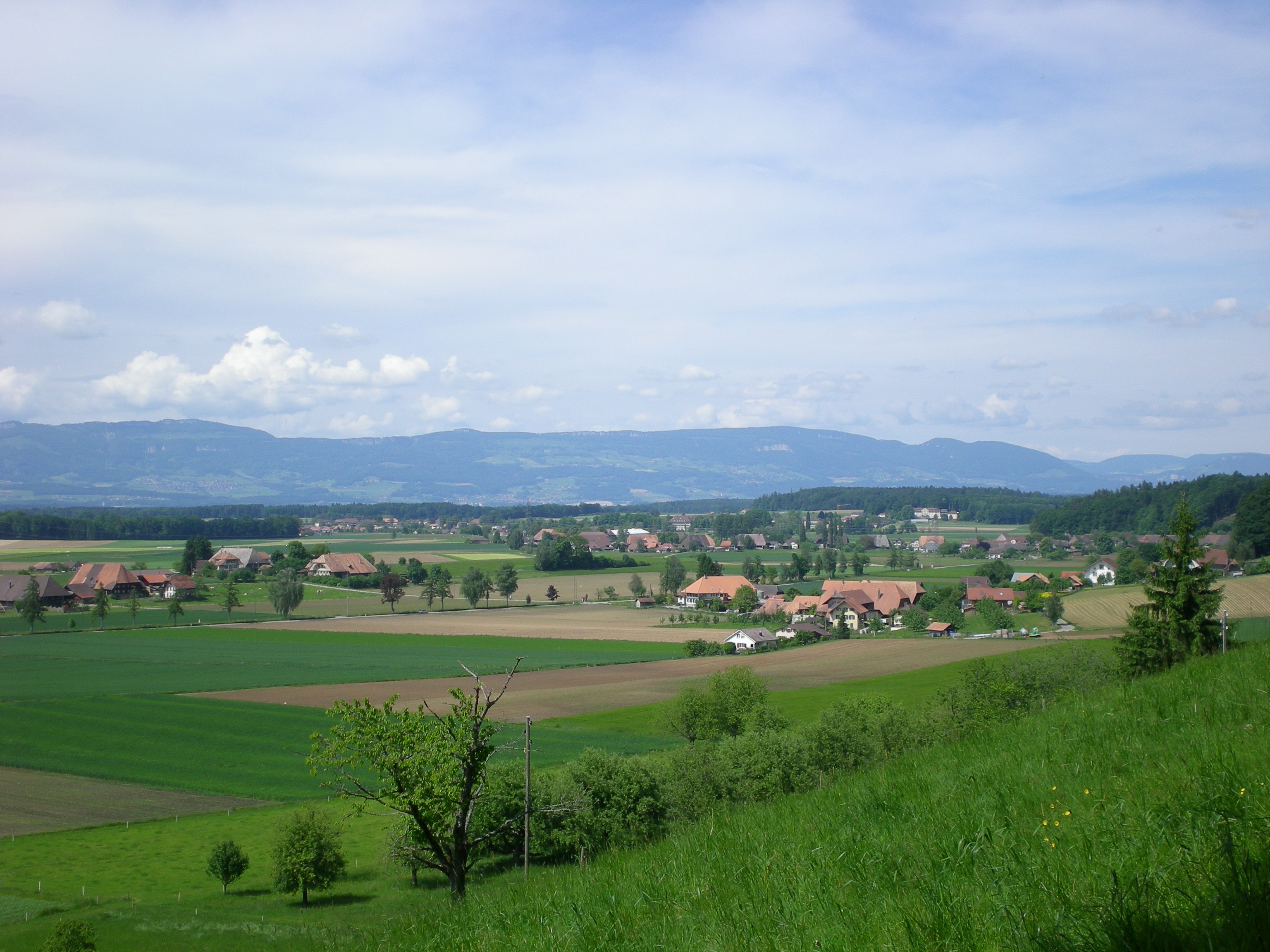 Ersigen Öschberg von Rudswil aus